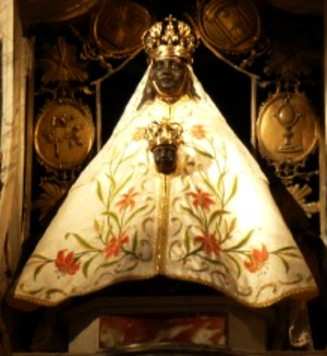 Vierge Noire Notre-Dame du Puy en Velay